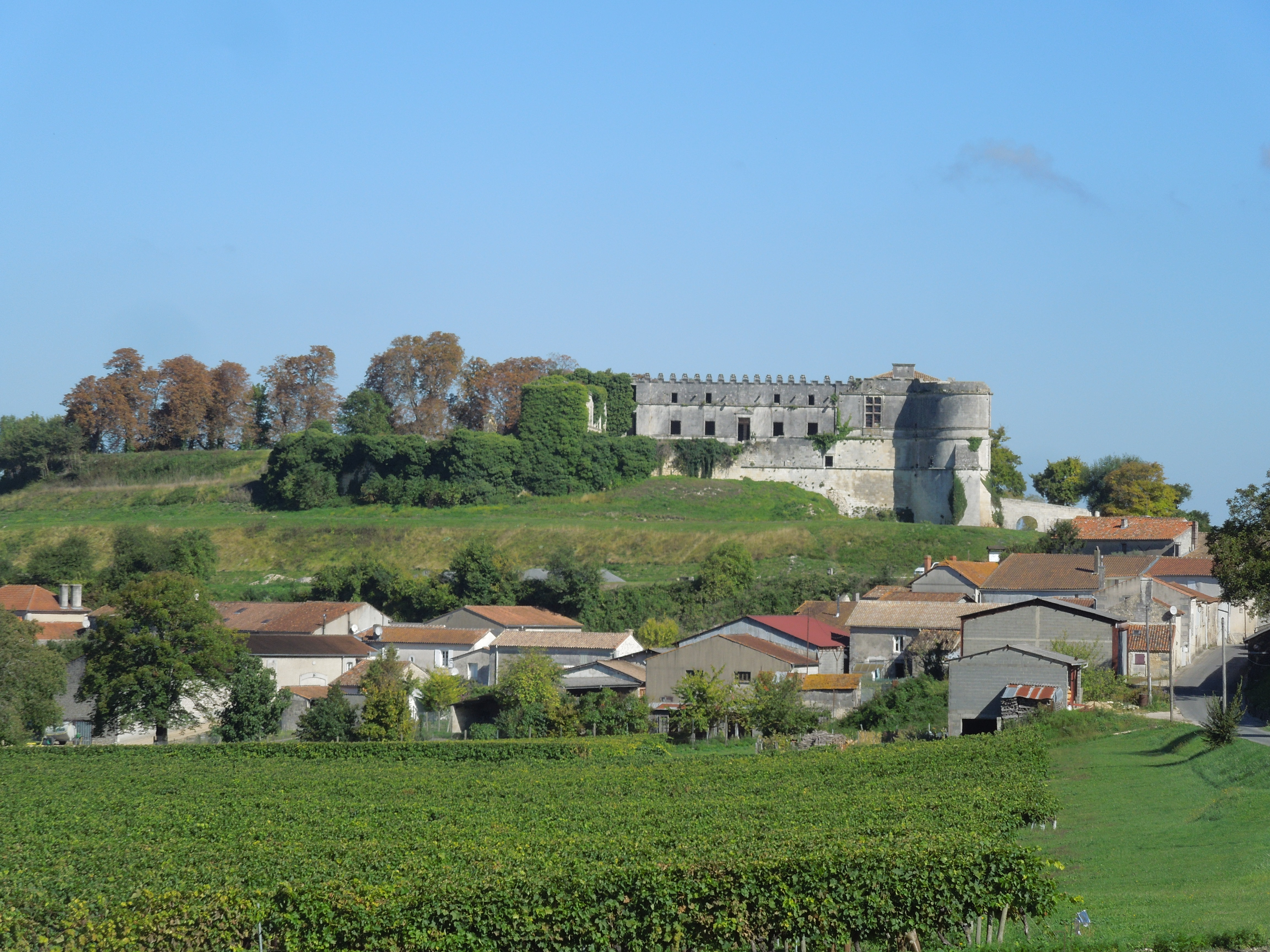 Bouteville und das Château de Bouteville, Blick von Süden